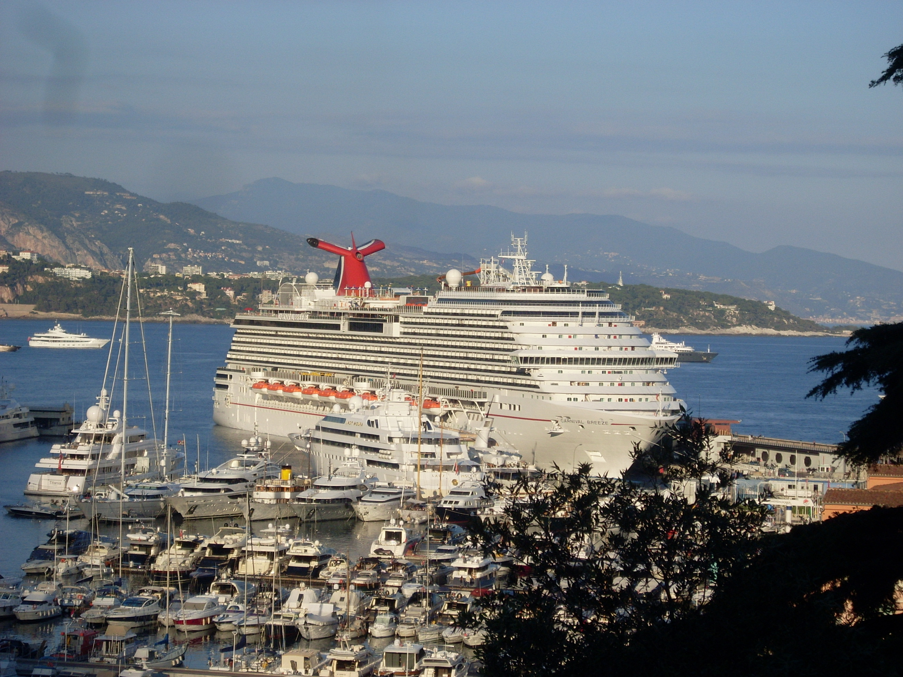 Die Carnival Breeze im Hafen von Monaco.